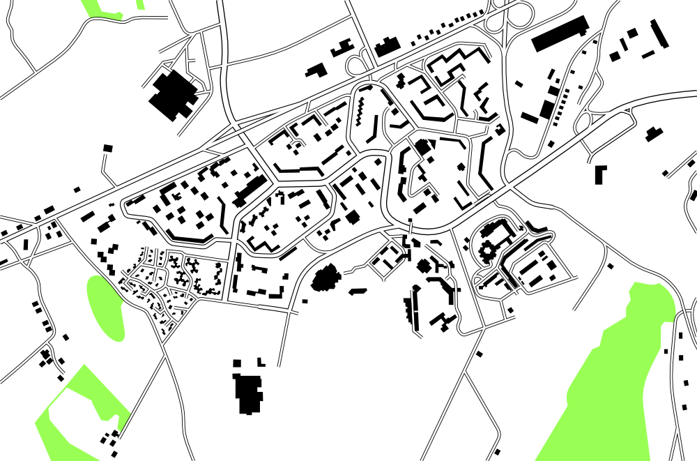 Plan du quartier de Planoise à Besançon réalisé à partir des cadastres de 1984.